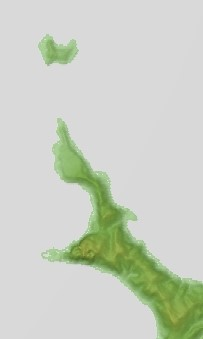 File:Rebun Relief Map, SRTM.jpgよりトド島周辺を抜粋